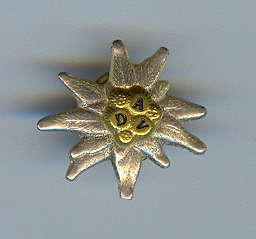 Deutscher Alpenverein, Gemeines Mitgliedschaftsabzeichen